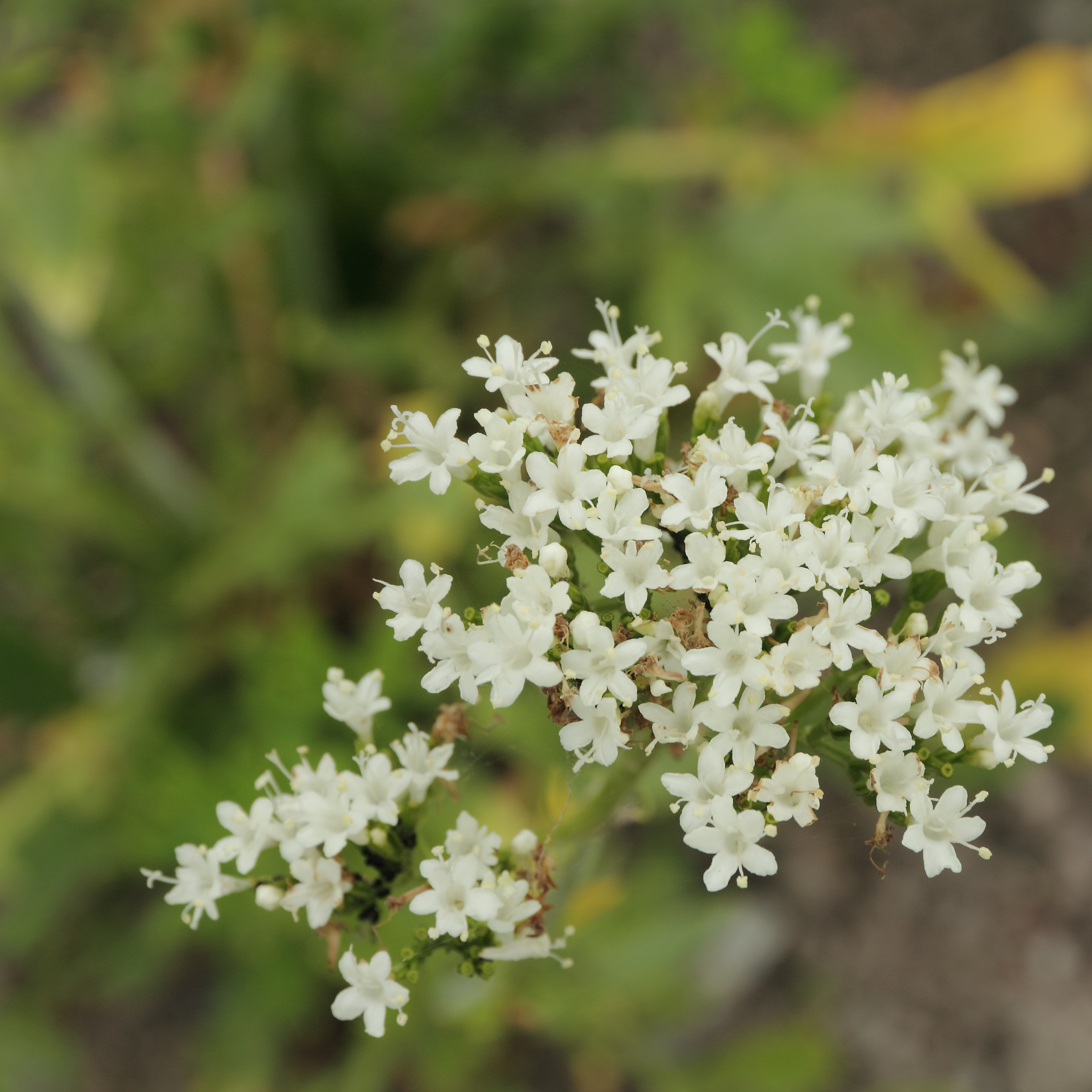 Valeriana phu i Bergianska trädgården.